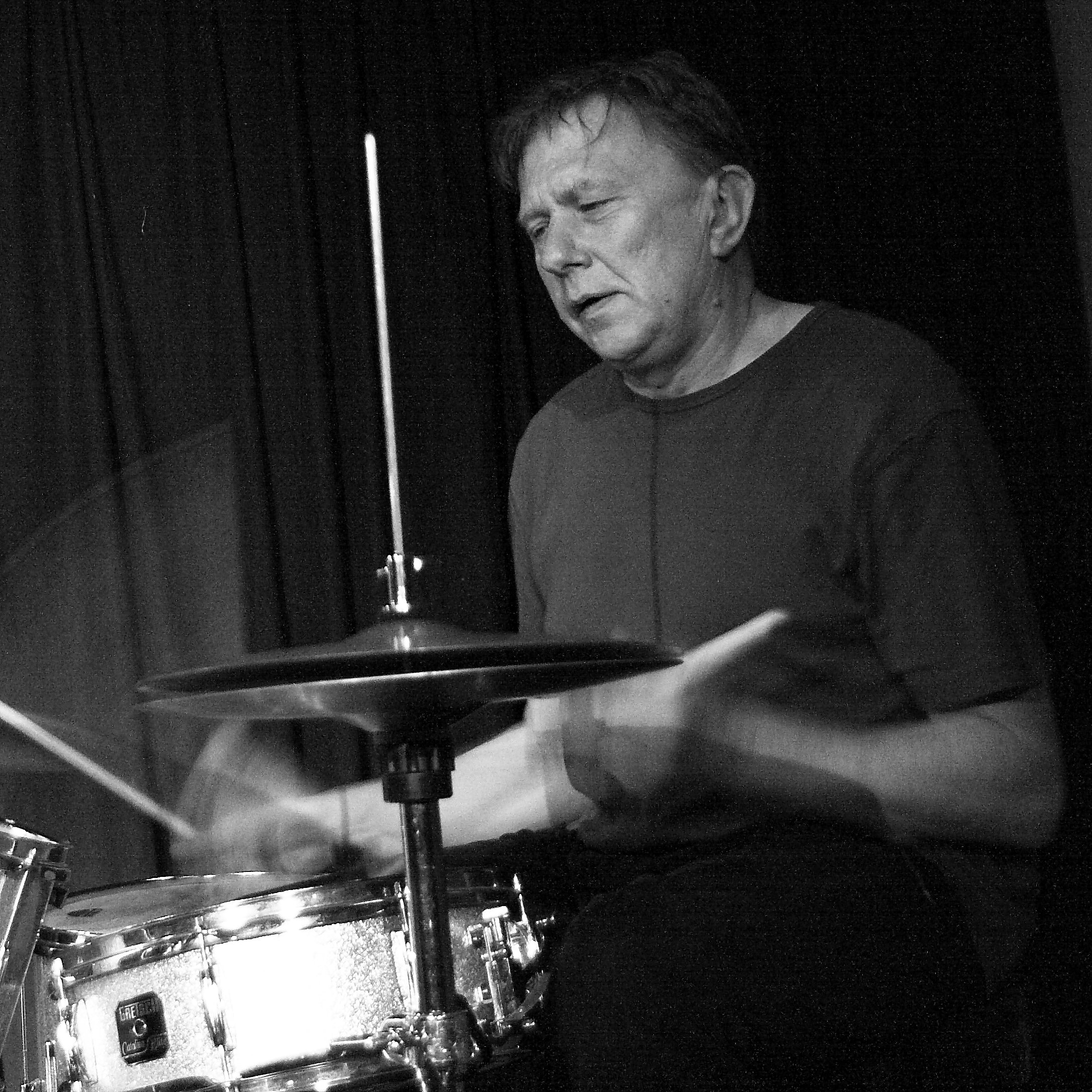 Konzert mit Boom Box (Akira Ando, Thomas Borgmann und Willi Kellers) im Club W71